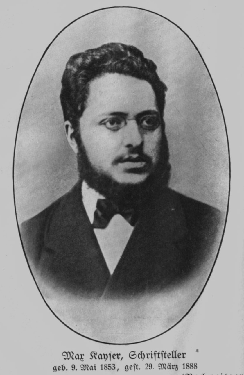 Max Kayser (1853-1888)